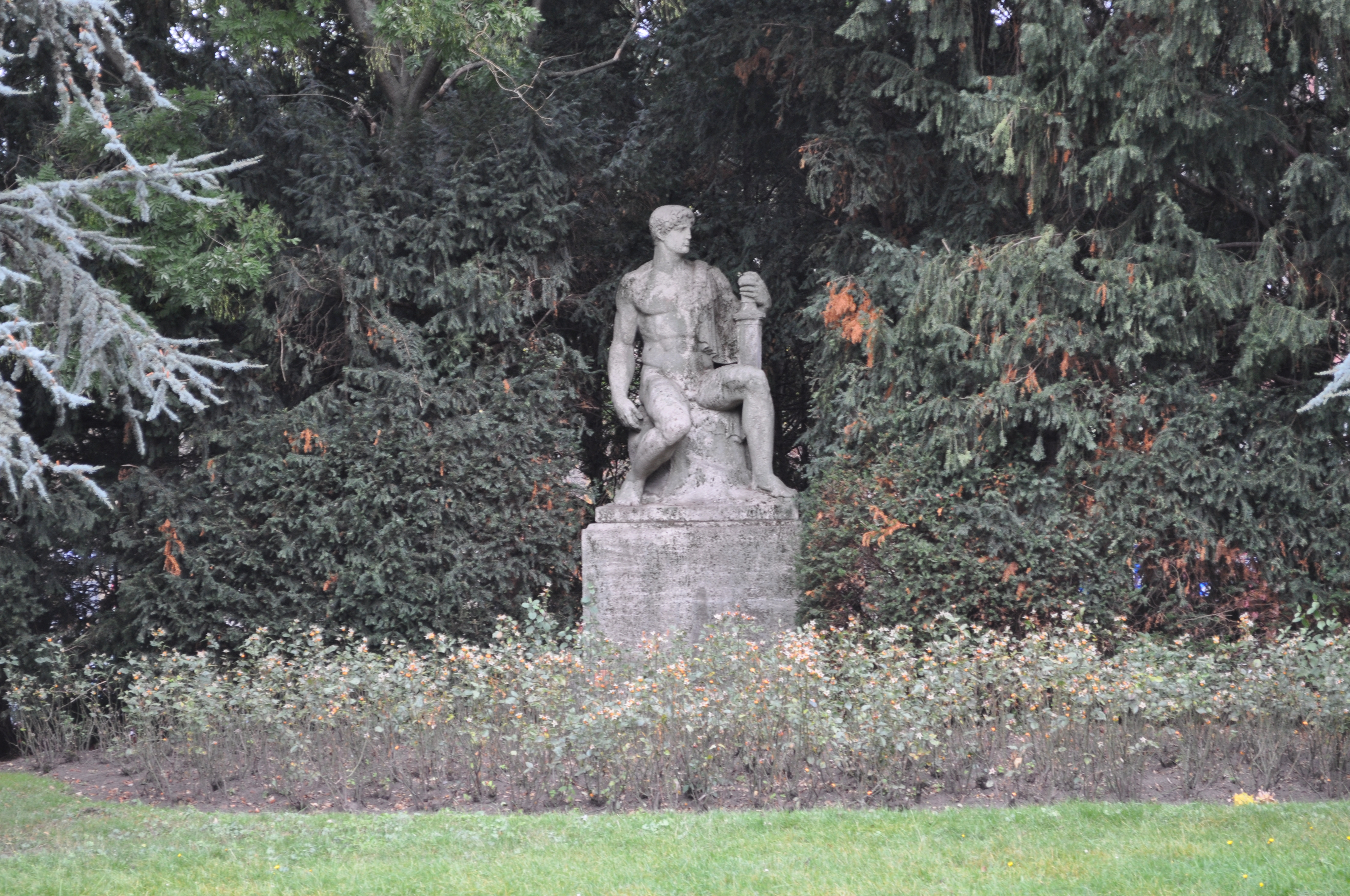 Zu Ehren des Dichters und Freiheitskämpfers Theodor Körner (1791–1813) wurde dieses Denkmal durch Carl Stock geschaffen, das einen sitzenden Krieger mit Schwert im antiken Stil darstellt.